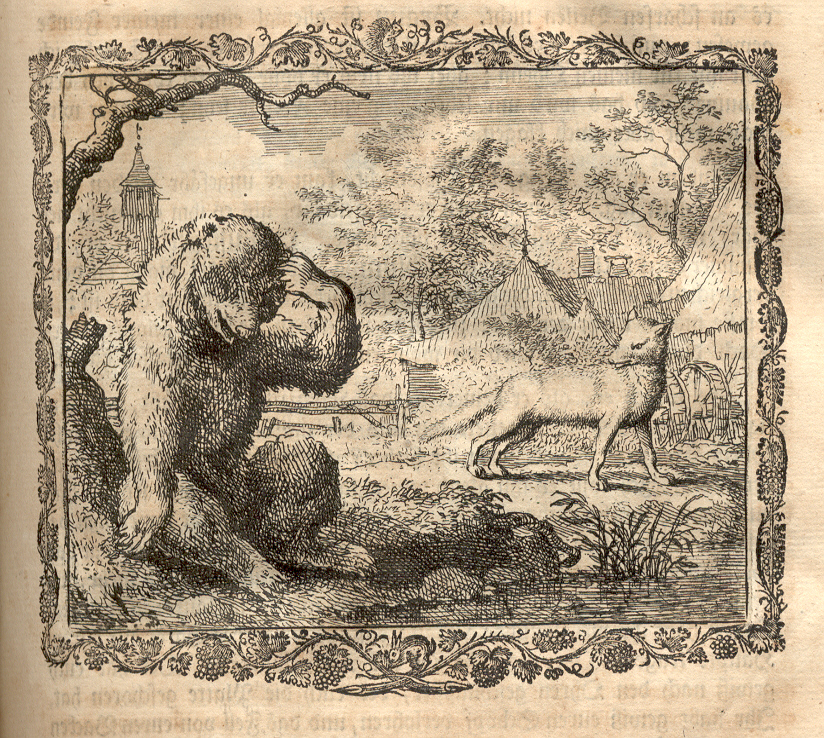 Illustration des 10. Hauptstücks im Ersten Buch. Kupferstich 11,5 x 12,5 cm von Allart van Everdingen